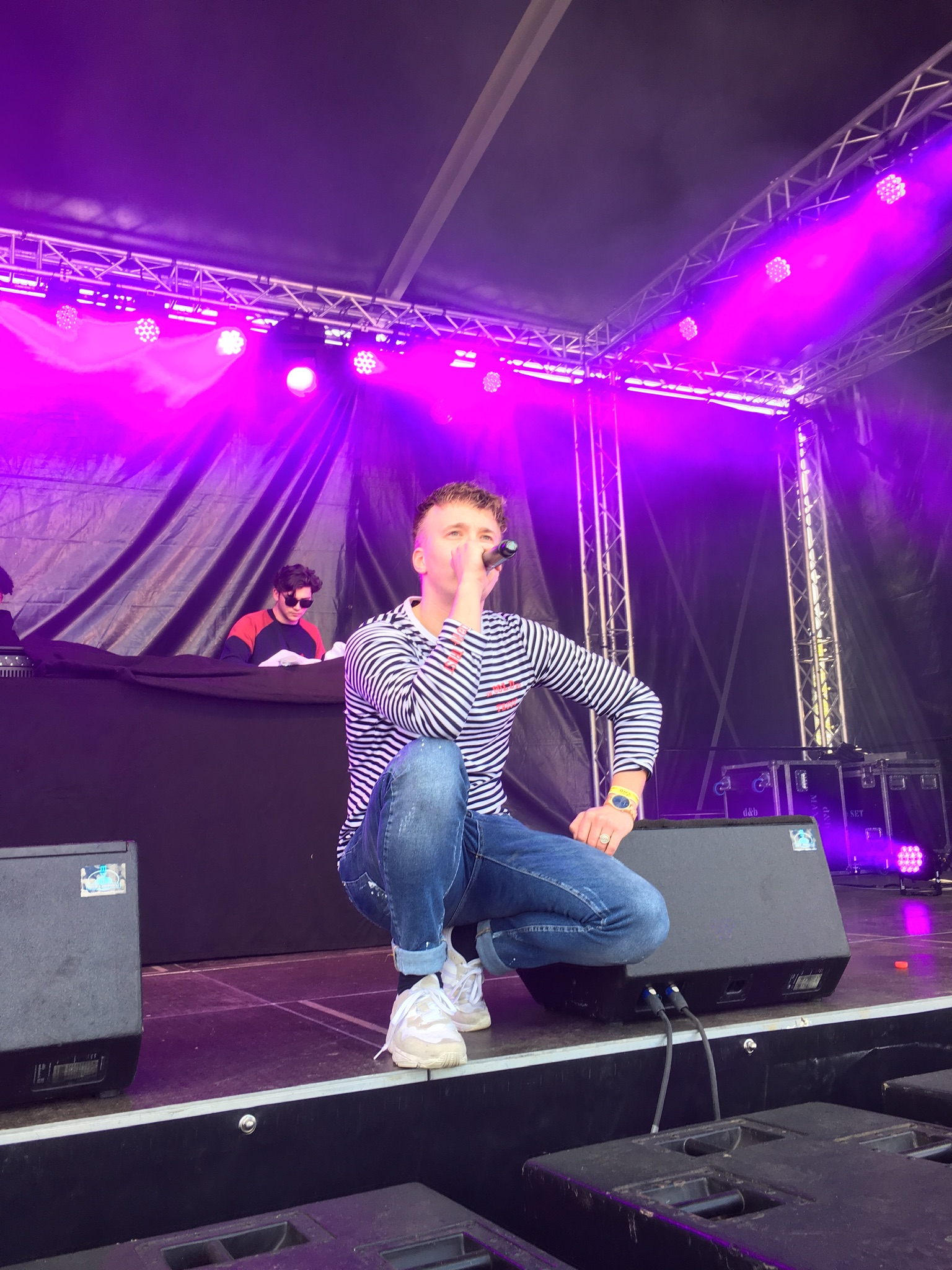 Snelle, pseudoniem van Lars Bos, op framedfestival